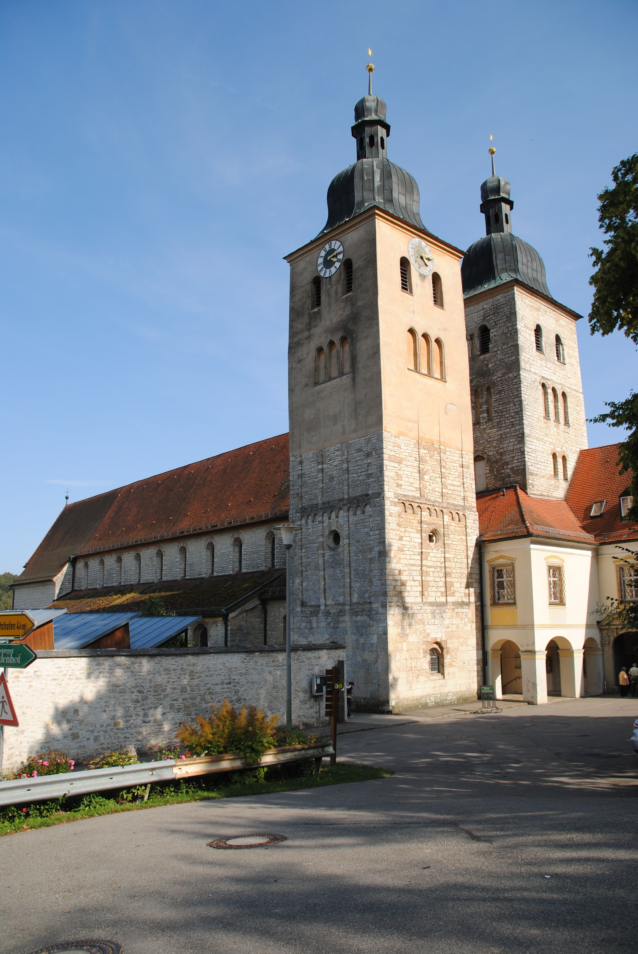 Türme der Abtei Plankstetten